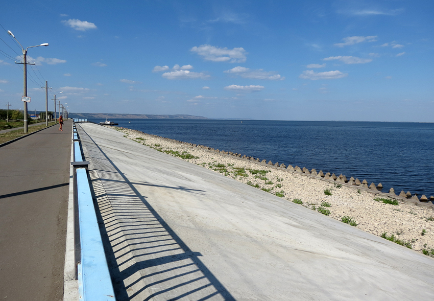 Русский